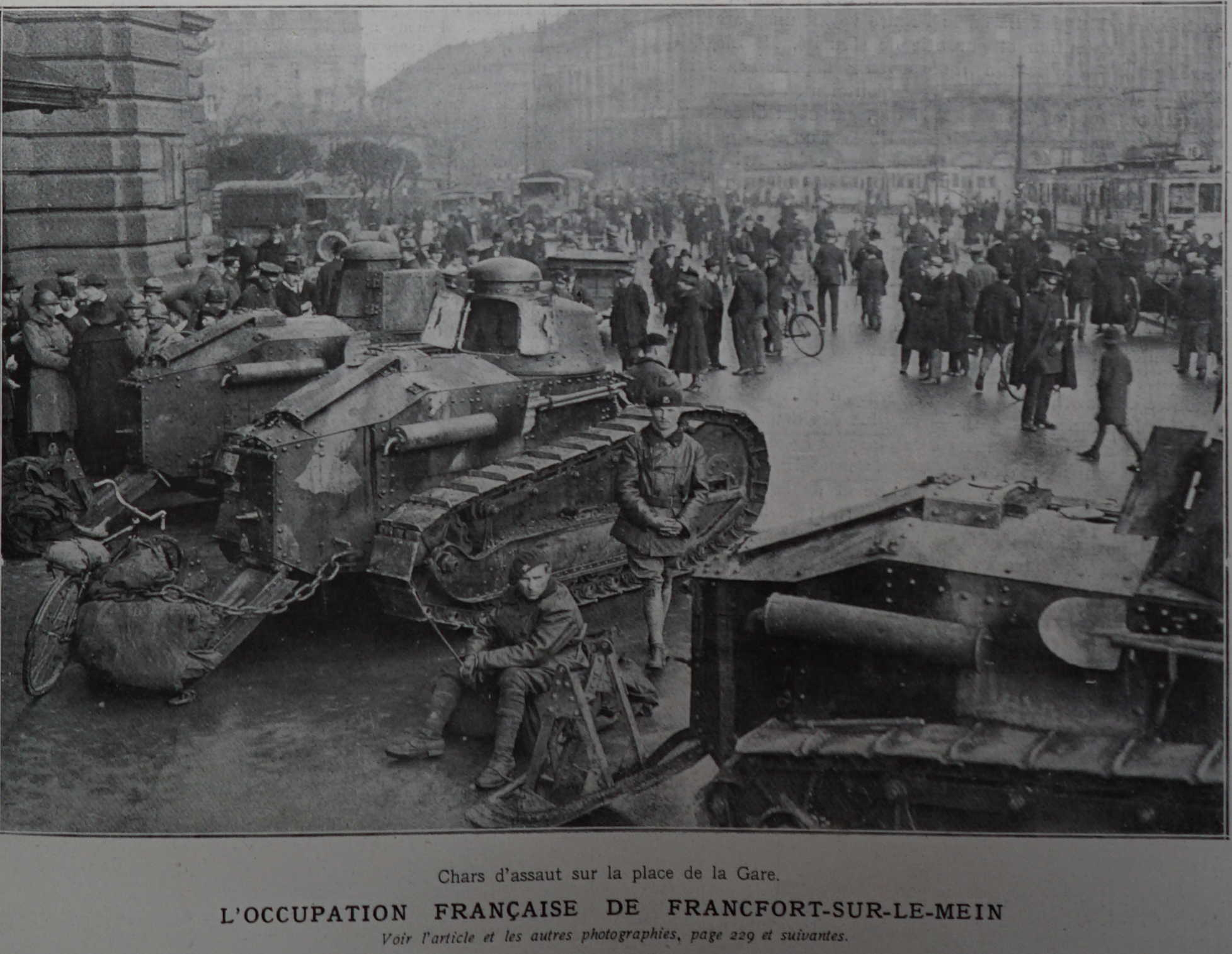 dans L'Illustration de 1920, des images des émeutes du 6 mai 1920.